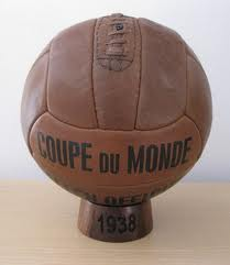 balon mundial 1938